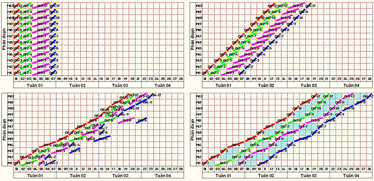 So sánh giữa Tổ chức các công tác chuyên môn trên mỗi sản phẩm theo đường găng quy trình công nghệ (công việc trọn gói, khi đó toàn bộ sơ đồ mạng(dự án) đều găng) với Tổ chức thực hiện công việc theo dây chuyền chuyên môn (tức dây chuyền đơn hay, công việc chuyên môn).